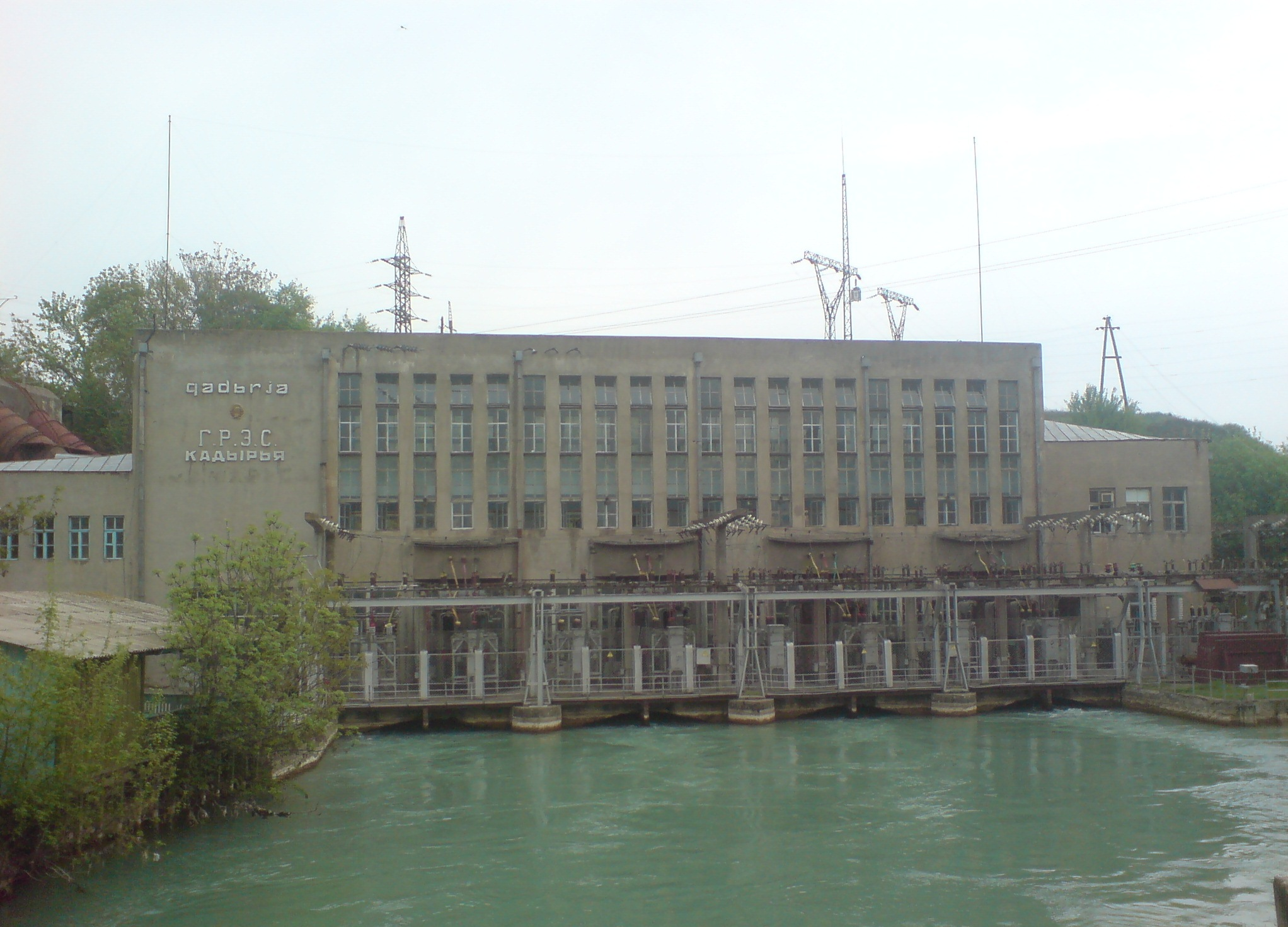 Кадырьинская ГЭС на канале Бозсу, посёлок Кадырия ГРЭС, Ташкентская область